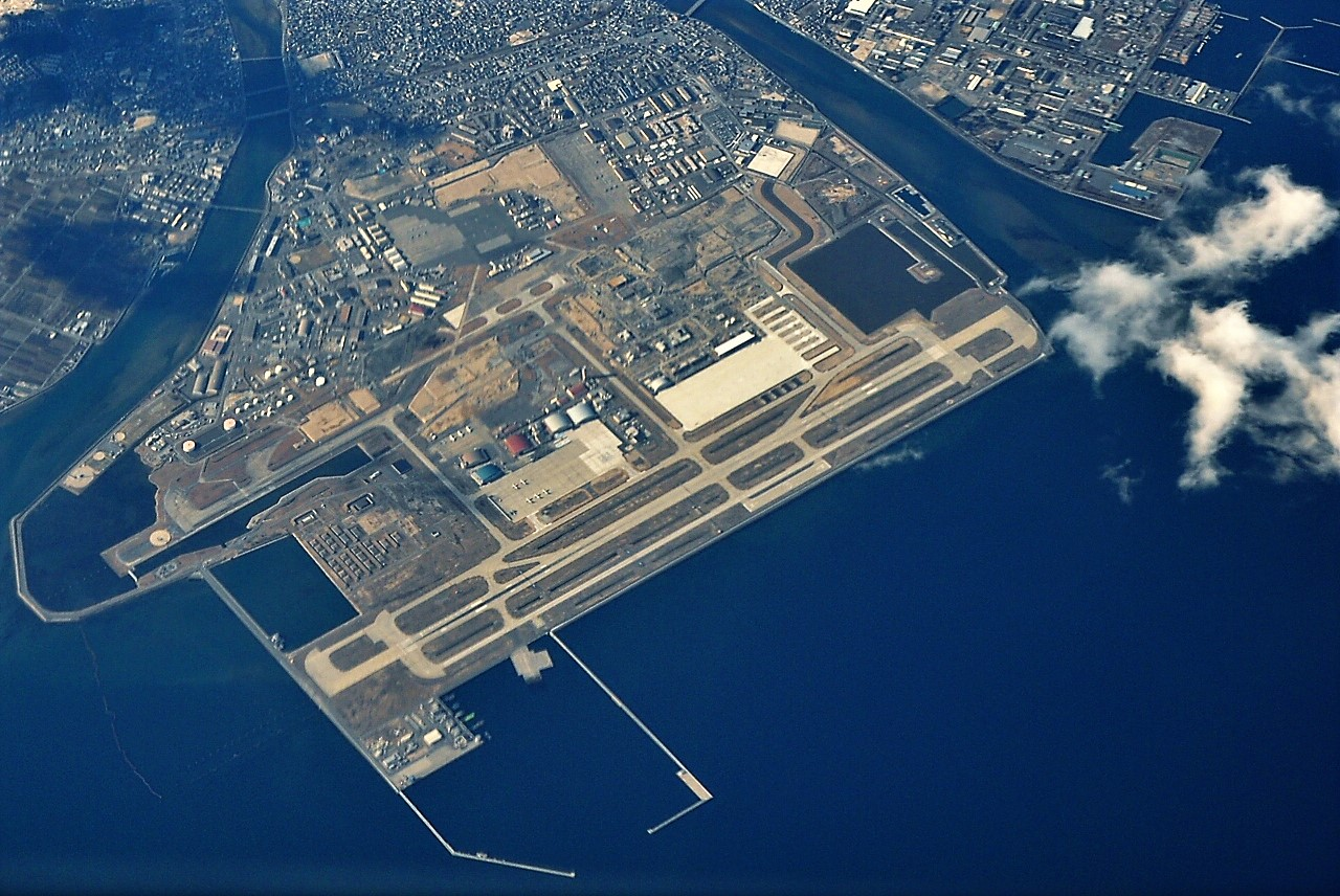 岩国錦帯橋空港（画面上側中央よりやや右側のごく狭い部分）と岩国米軍基地。海上自衛隊 岩国航空基地も敷地内に同居する。